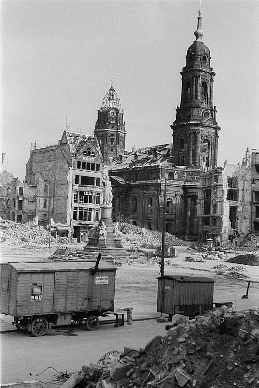 Original image description from the Deutsche FotothekAnsicht mit Siegesdenkmal, Rathausturm und Kreuzkirche